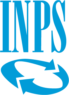 Il logo dell’Istituto nazionale della previdenza sociale.